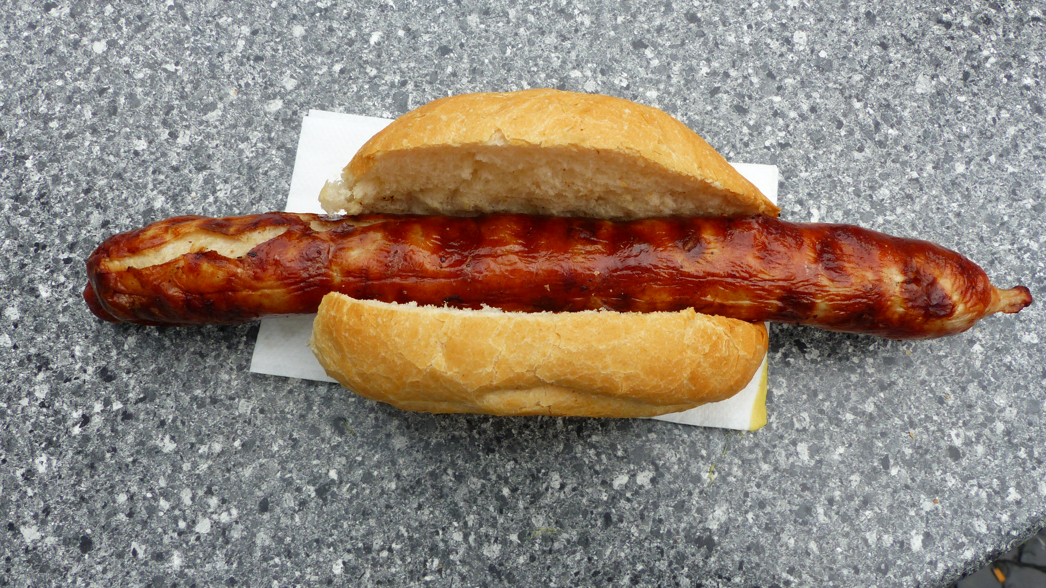 Thüringer Rostbratwurst, auf dem Markt in Weimar